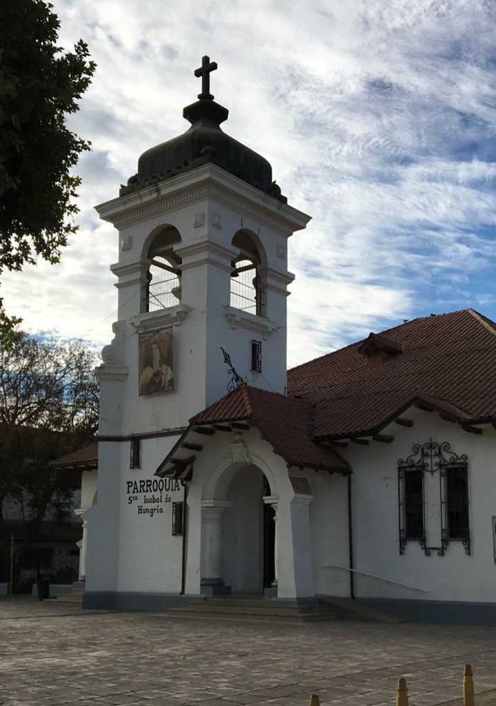 Iglesia de Santa Isabel de Hungría, El Melón, Chile